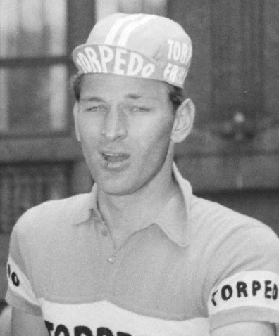 Ploegen van de Ronde van Nederland aan de start, Duitse (Torpedo) ploeg